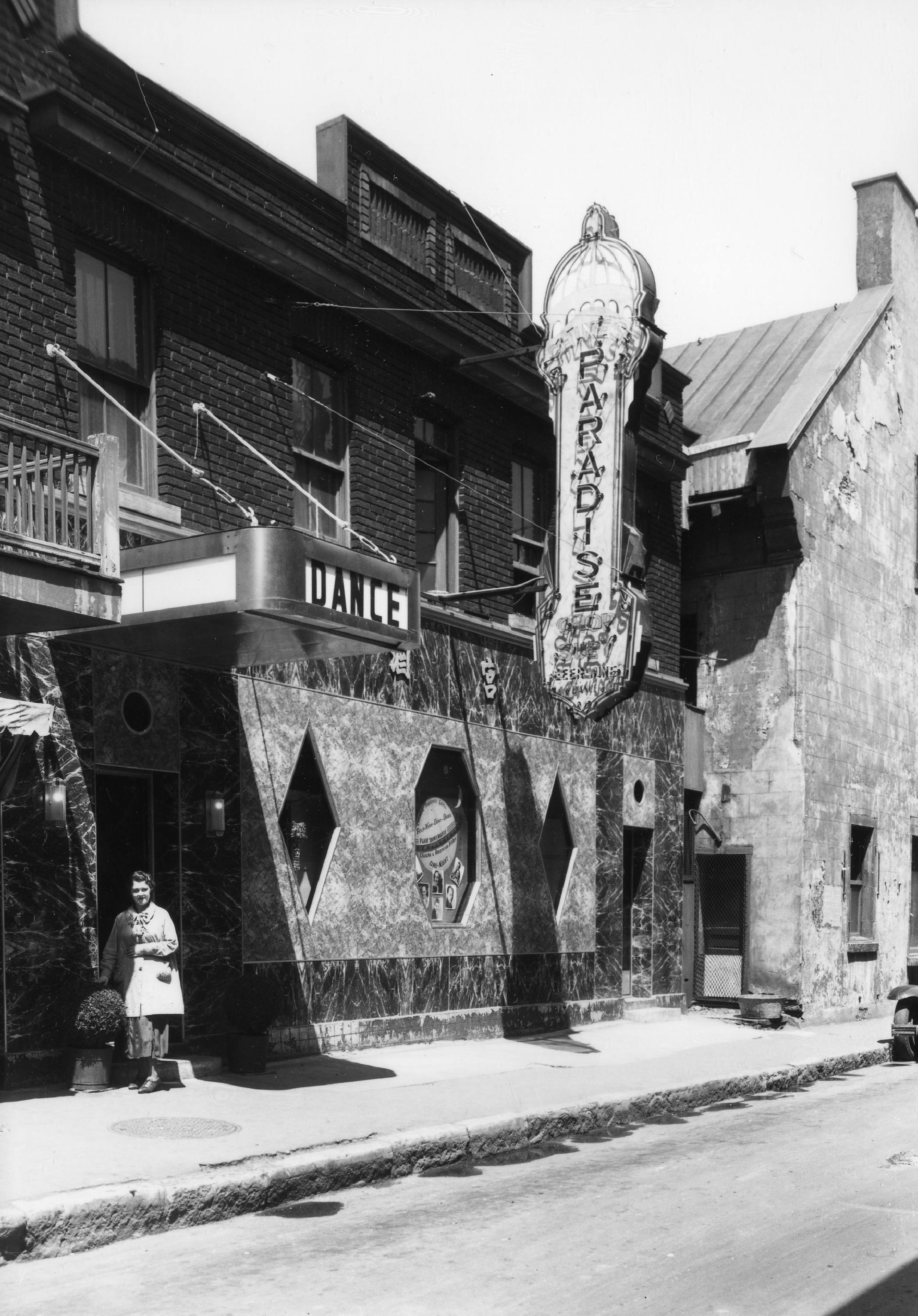 Photo du Cabaret Chinese Paradise (Montréal, Canada), Année 1930